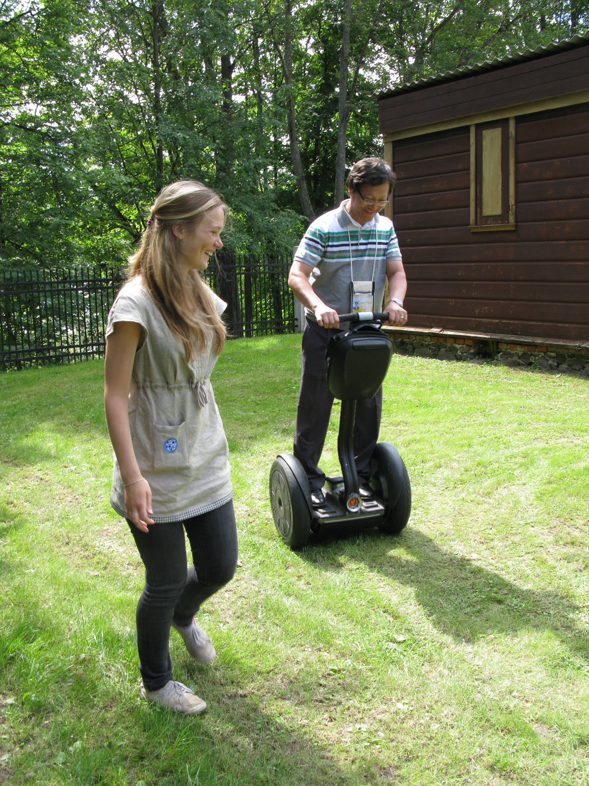 Sõiduharjutused Segwayl Tartu tähetorni juures Toomemäel Tartu hansapäevadel, 20. juuli 2012. Foto: Oop.